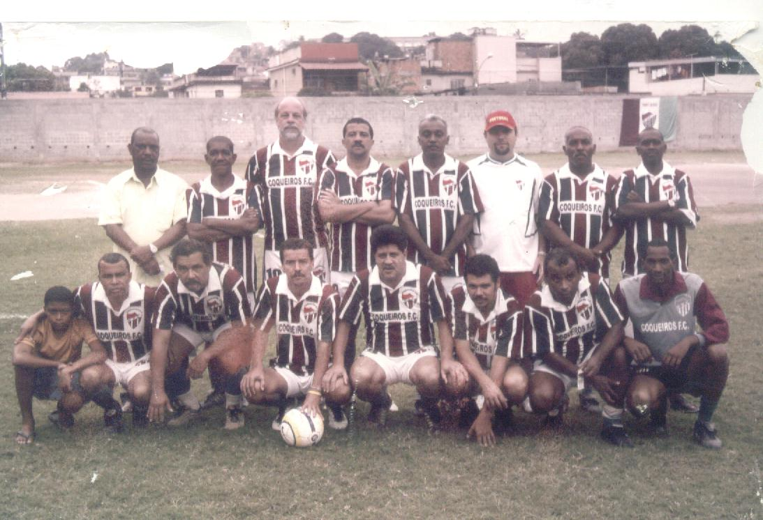 Equipe de veteranos do Coqueiros Futebol Clube, de São João de Meriti.